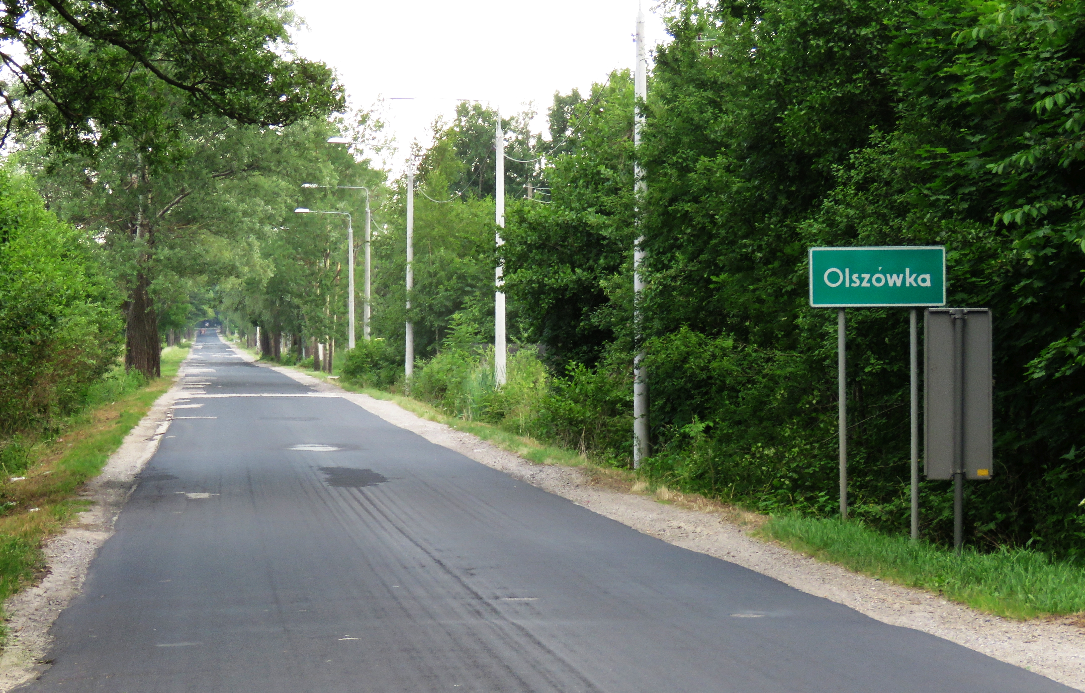 Olszówka